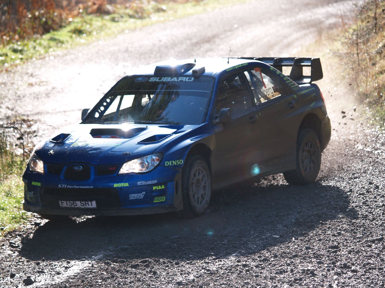 Petter Solberg driving his Subaru Impreza WRC 2007 during 2007 Wales Rally GB.